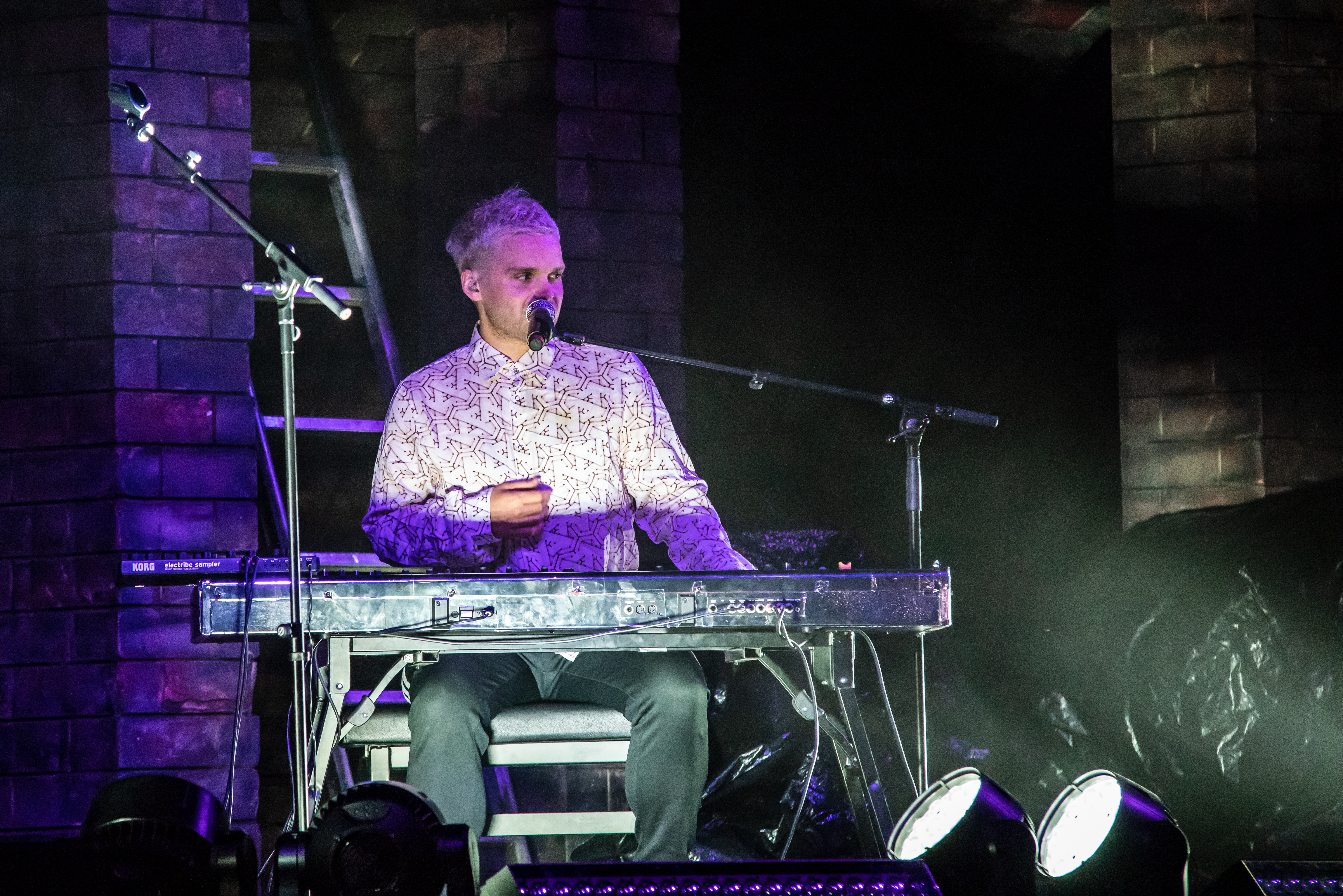 Bilder vom Zelt Musik Festival 2018 in Freiburg im Breisgau Auftritt Tristan Brusch am 20. Juli 2018 im Zirkuszelt